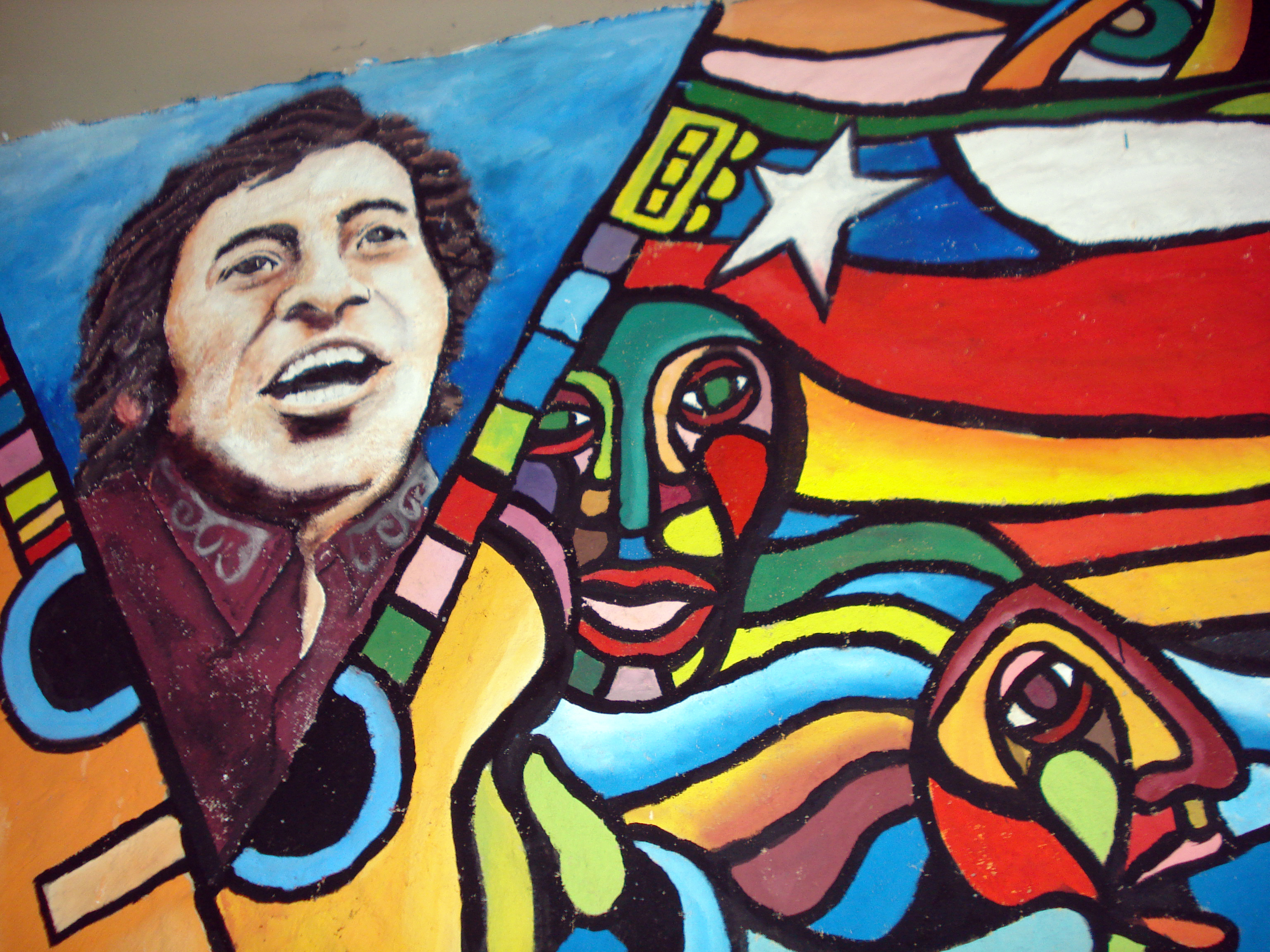 Mural a Víctor Jara, pintado en el galpón que lleva su nombre. Barrio Brasil, Santiago, Chile.